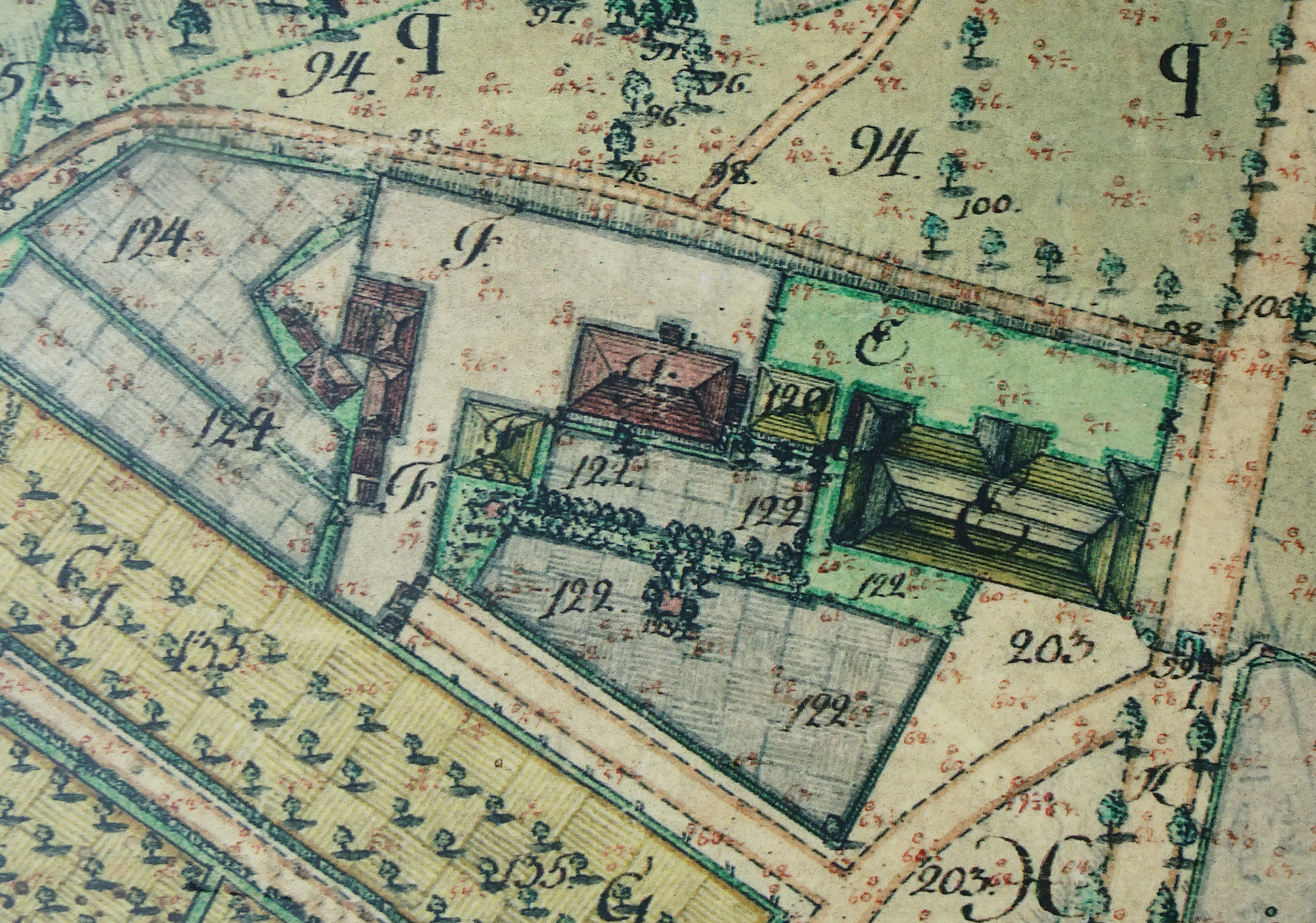 Confidencen och Gamla värdshuset (Ulriksdals slottsteater och Villa Ottilielund)